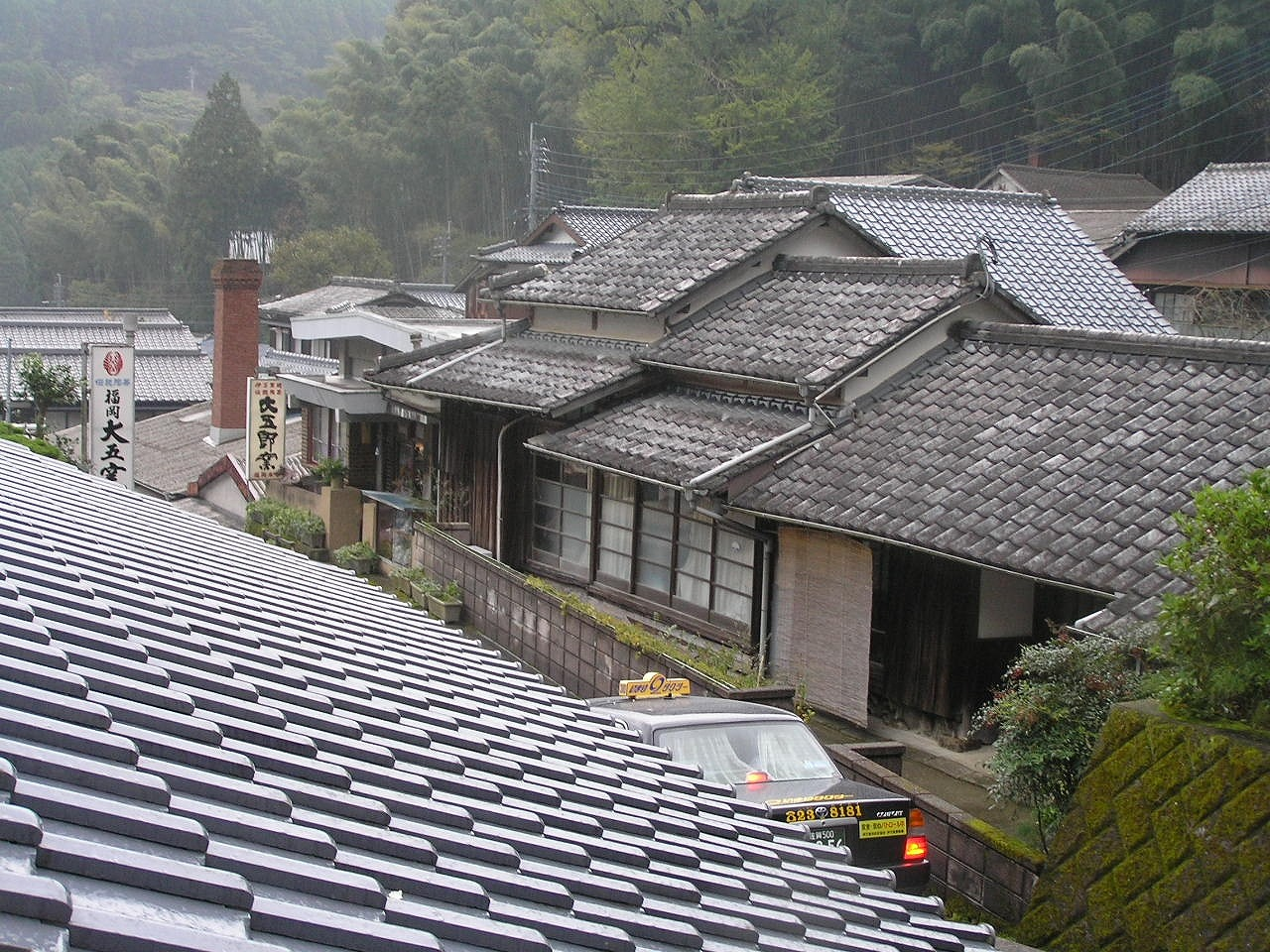 大川内山（おおかわちやま、佐賀県伊万里市)鍋島焼 大五郎窯の坂